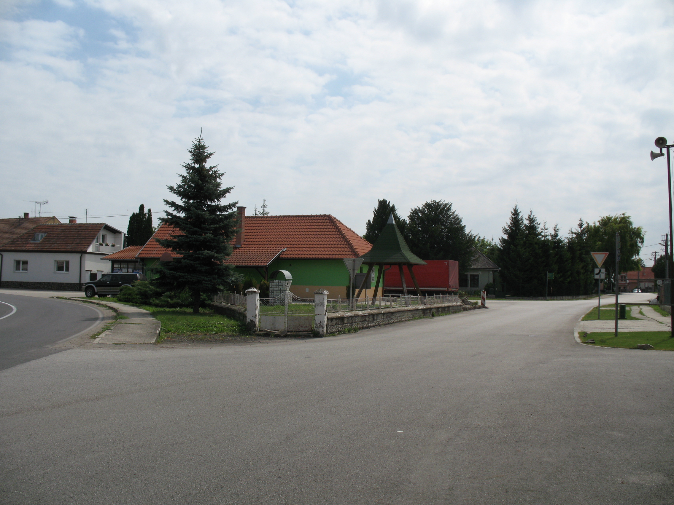 Nagyudvarnok